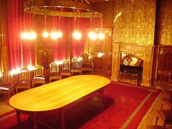 Blick in die Güldenkammer des Rathauses von Bremen